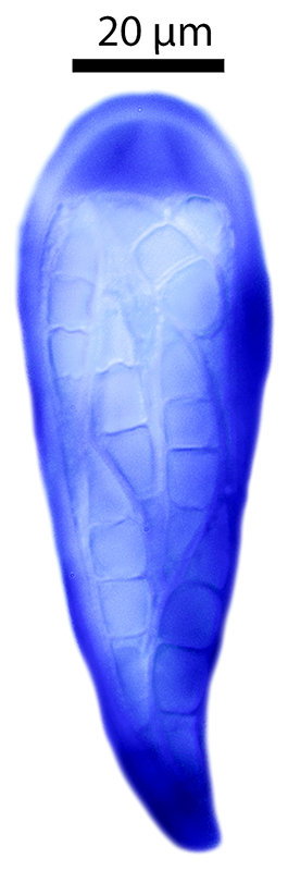 Ascus von Bilimbia sabuletorum (Schreber) Arnold